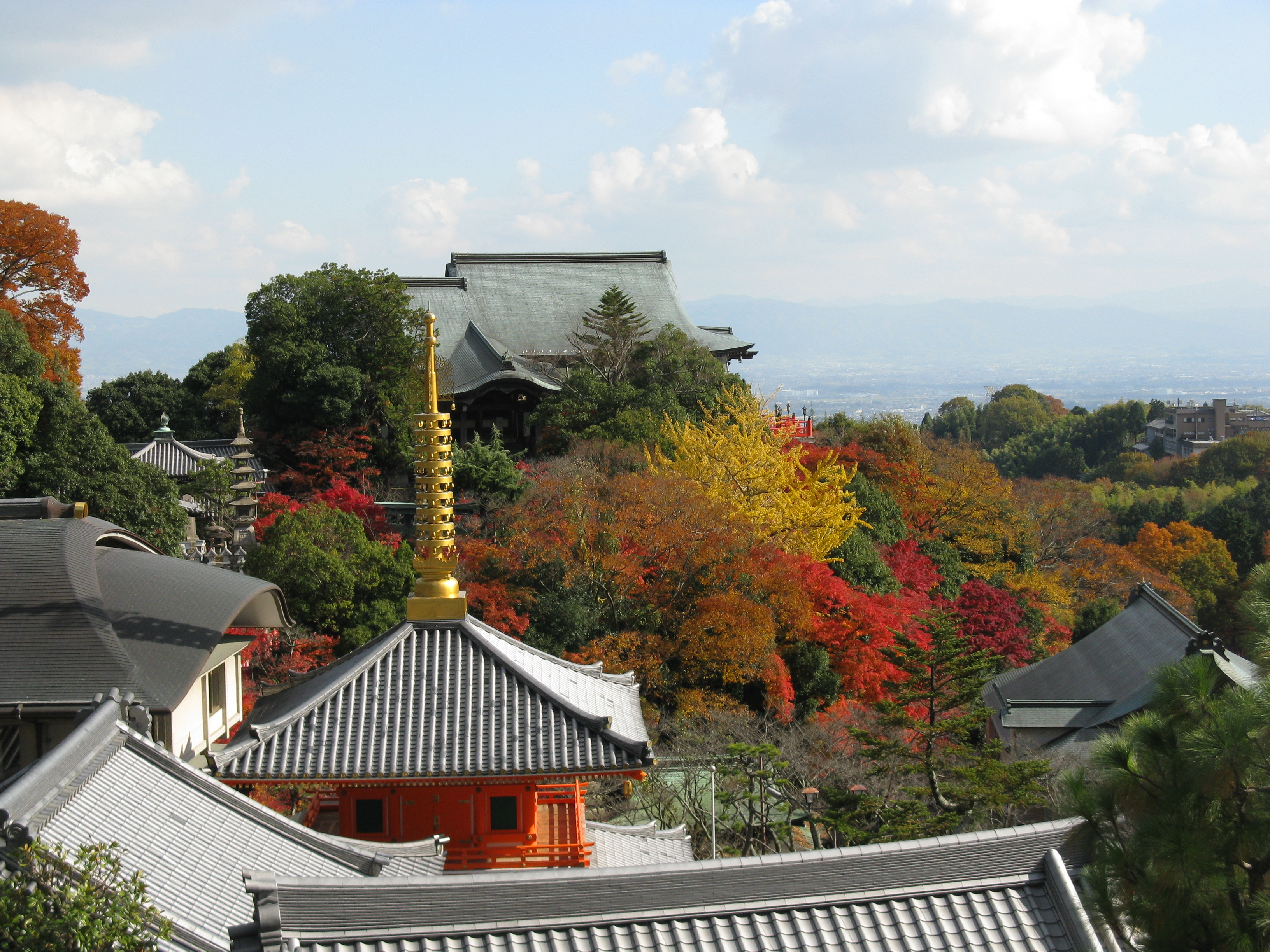 朝護孫子寺